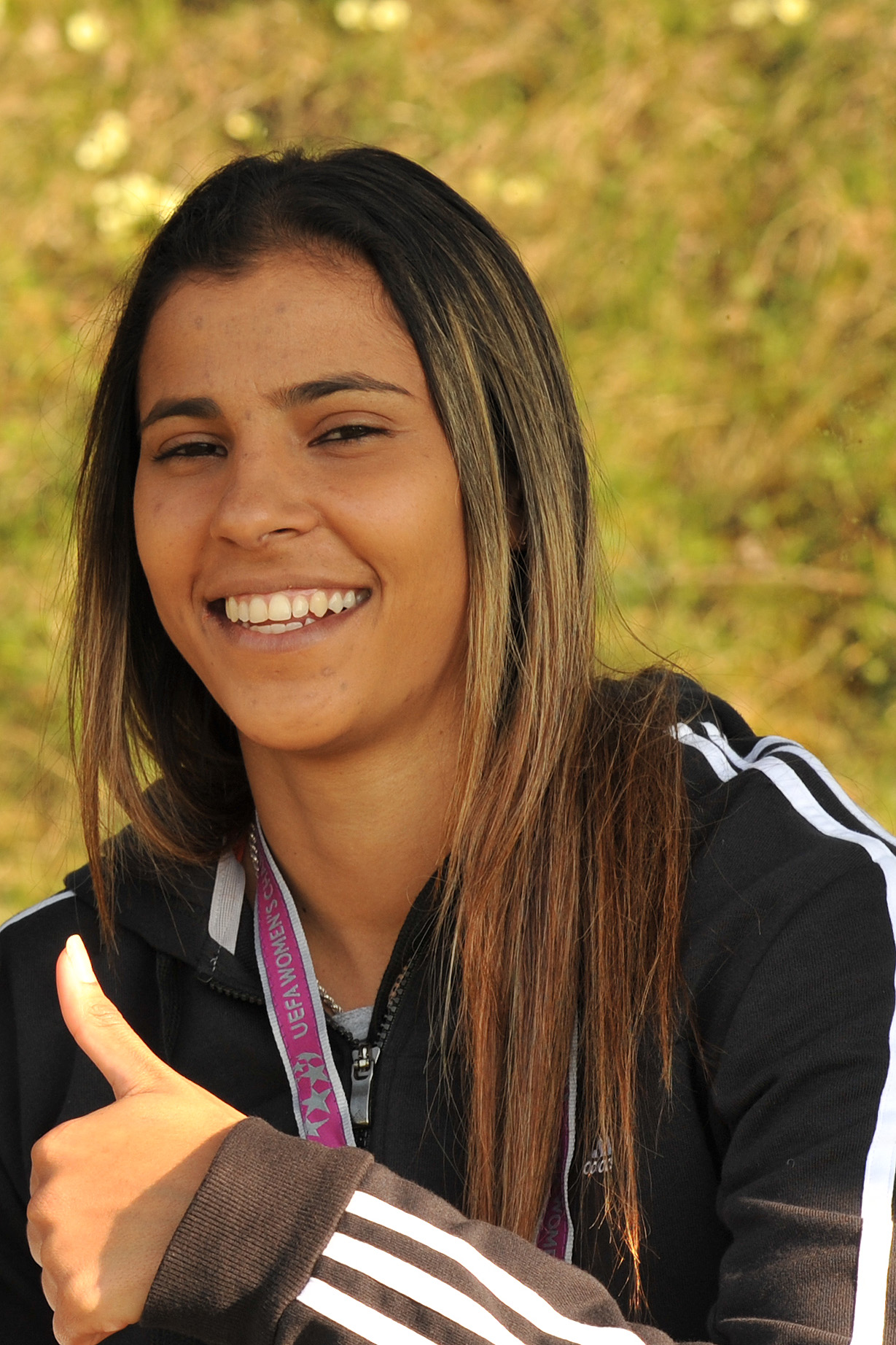 UEFA Women's Champions League 2013/14 SV Neulengbach - Tyresö FF Neulengbach, 29. März 2014 Fabiana da Silva Simoes